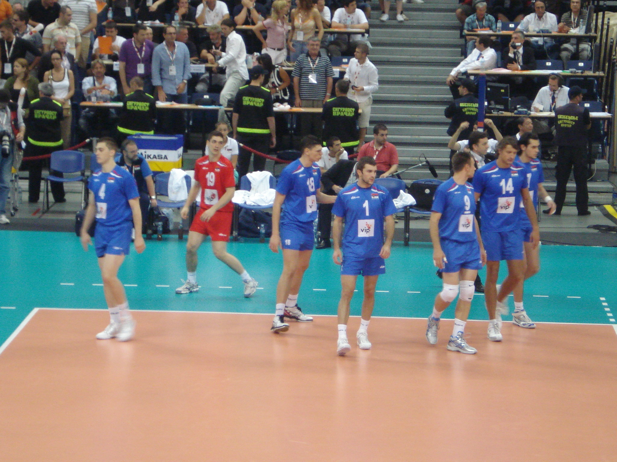 Одбојкашка репрезентација Србије Финале Светске лиге 2009. - Београдска арена Аутор: Јакша П.